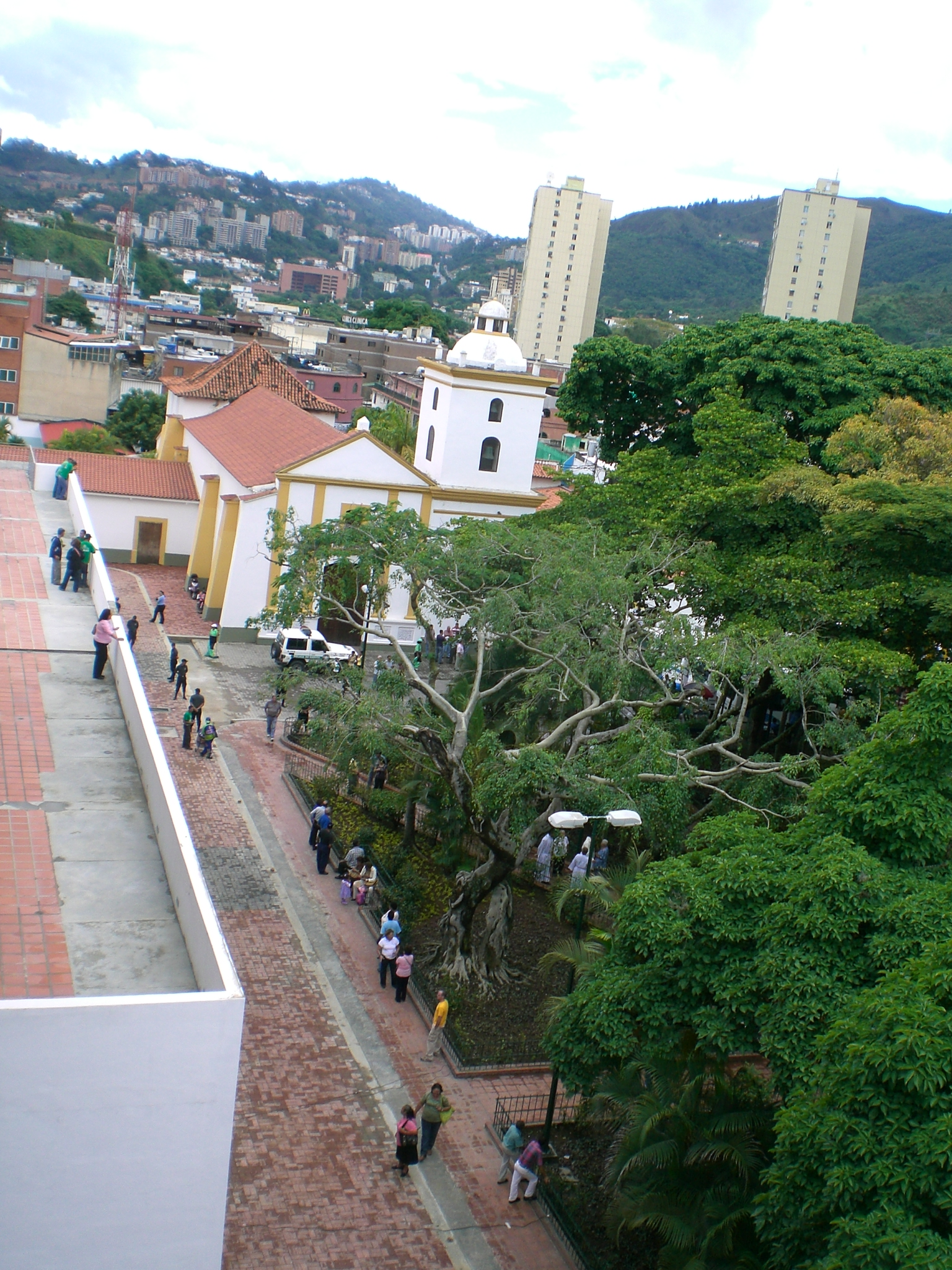 Nuestra Señora del Rosario de Baruta, Caracas, Venezuela.